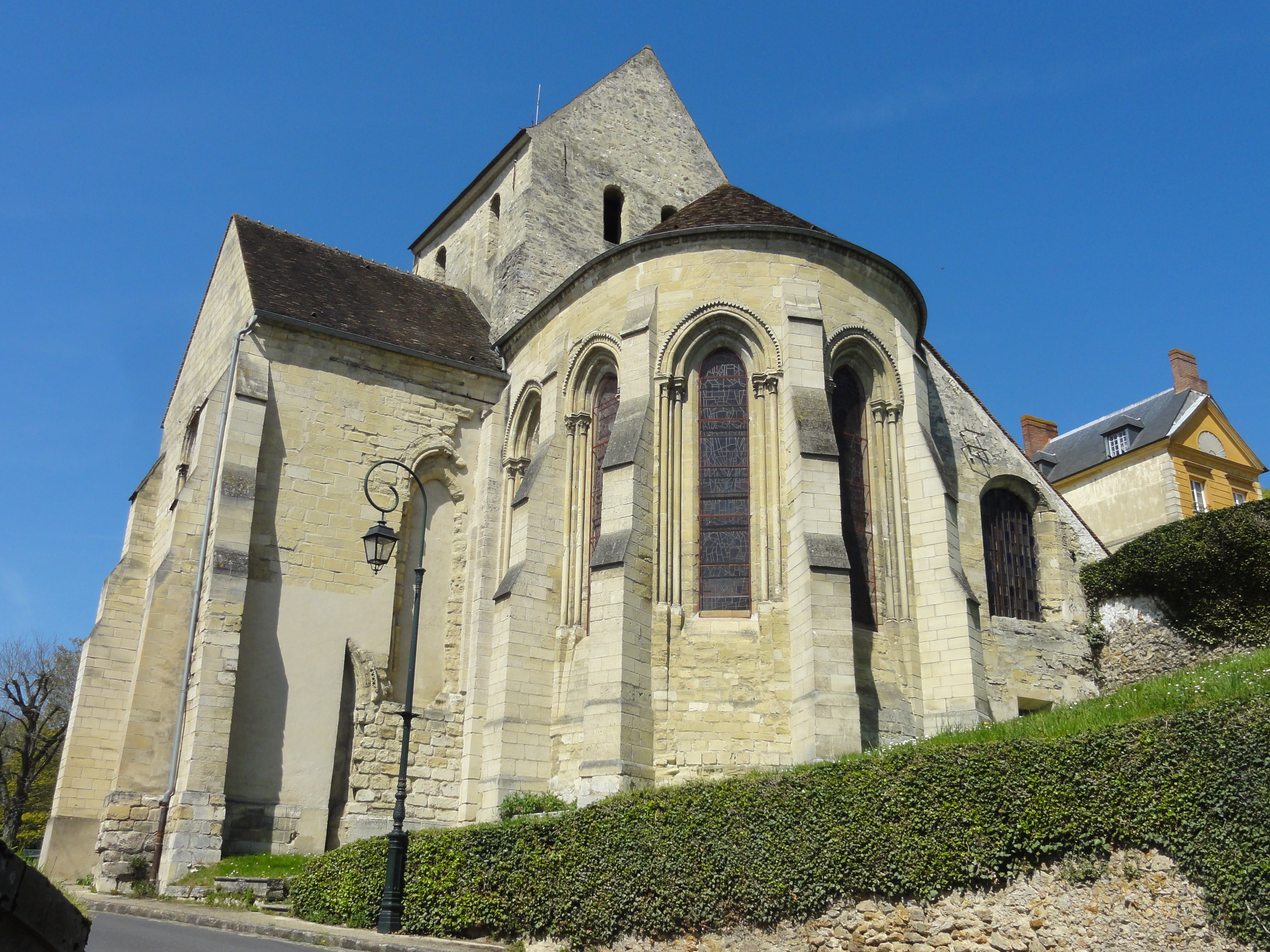 Église Saint-Pierre-aux-Liens de Vaux-sur-Seine - voir titre.